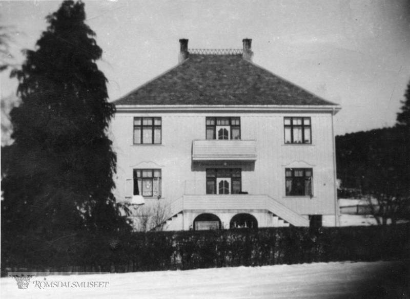 Breidablikk i 1929 etter oppgbyggingen